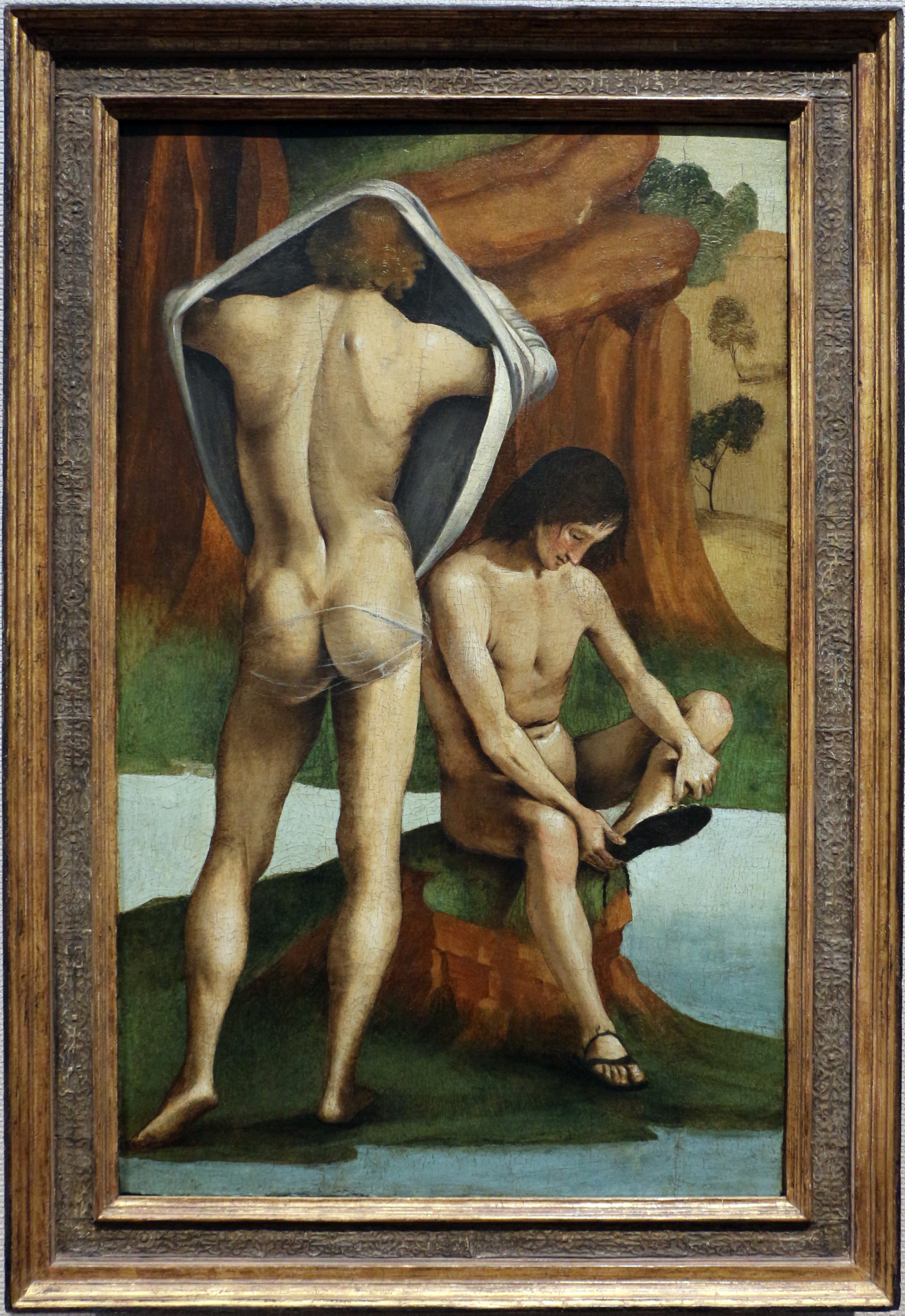 Fragment des Altarmittelteils der Pala Bichi, Sant'Agostino, Siena als Hintergrund einer Christopherus-Skulptur